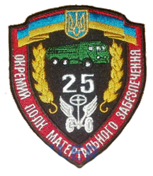 Шеврон 25-го окремого полку матеріального забезпечення тилу Збройних Сил України, в/ч А1559 (Балта) - 2 варіант